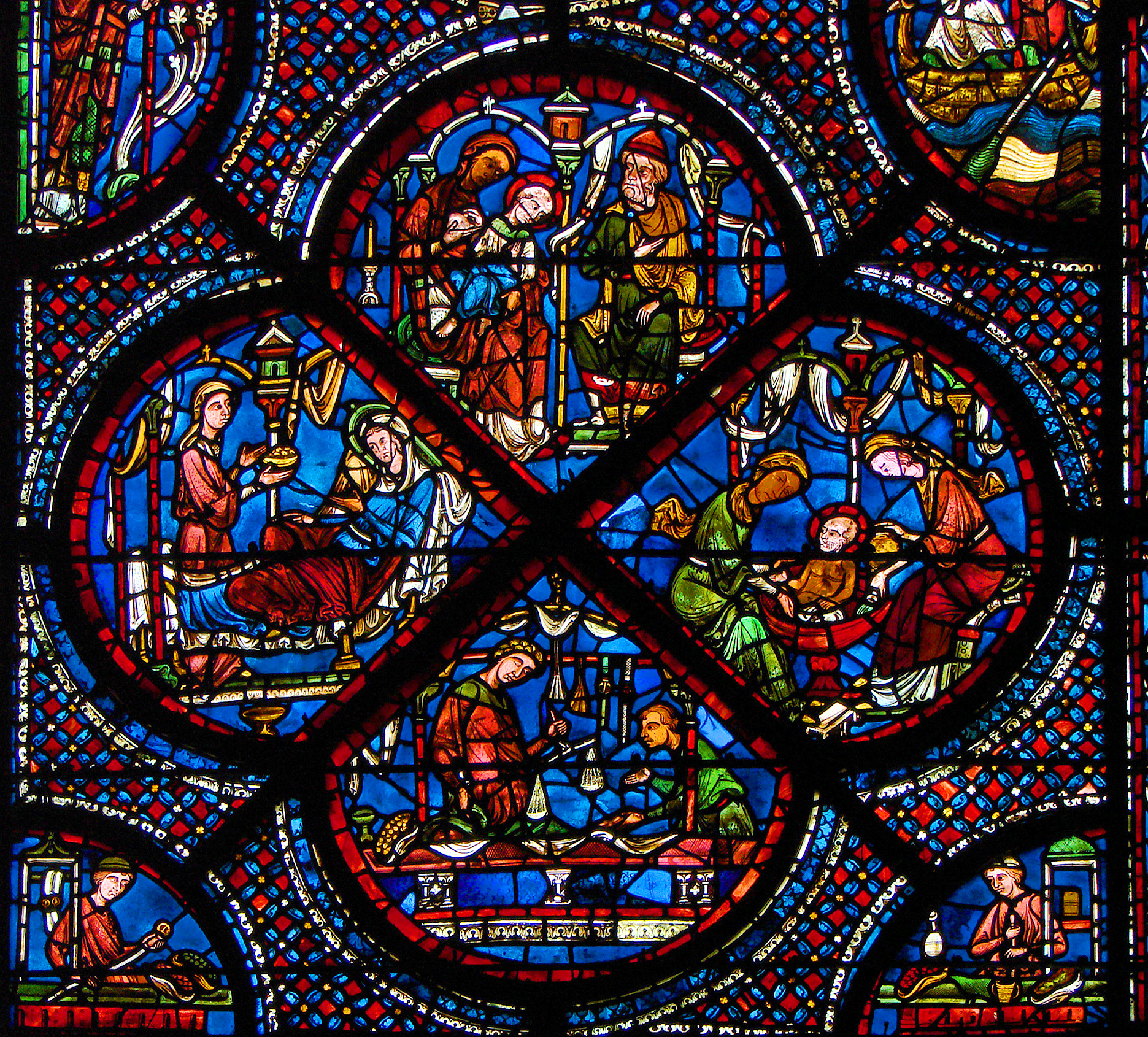 Détail d'un vitrail de la cathédrale Notre-Dame de Chartres.